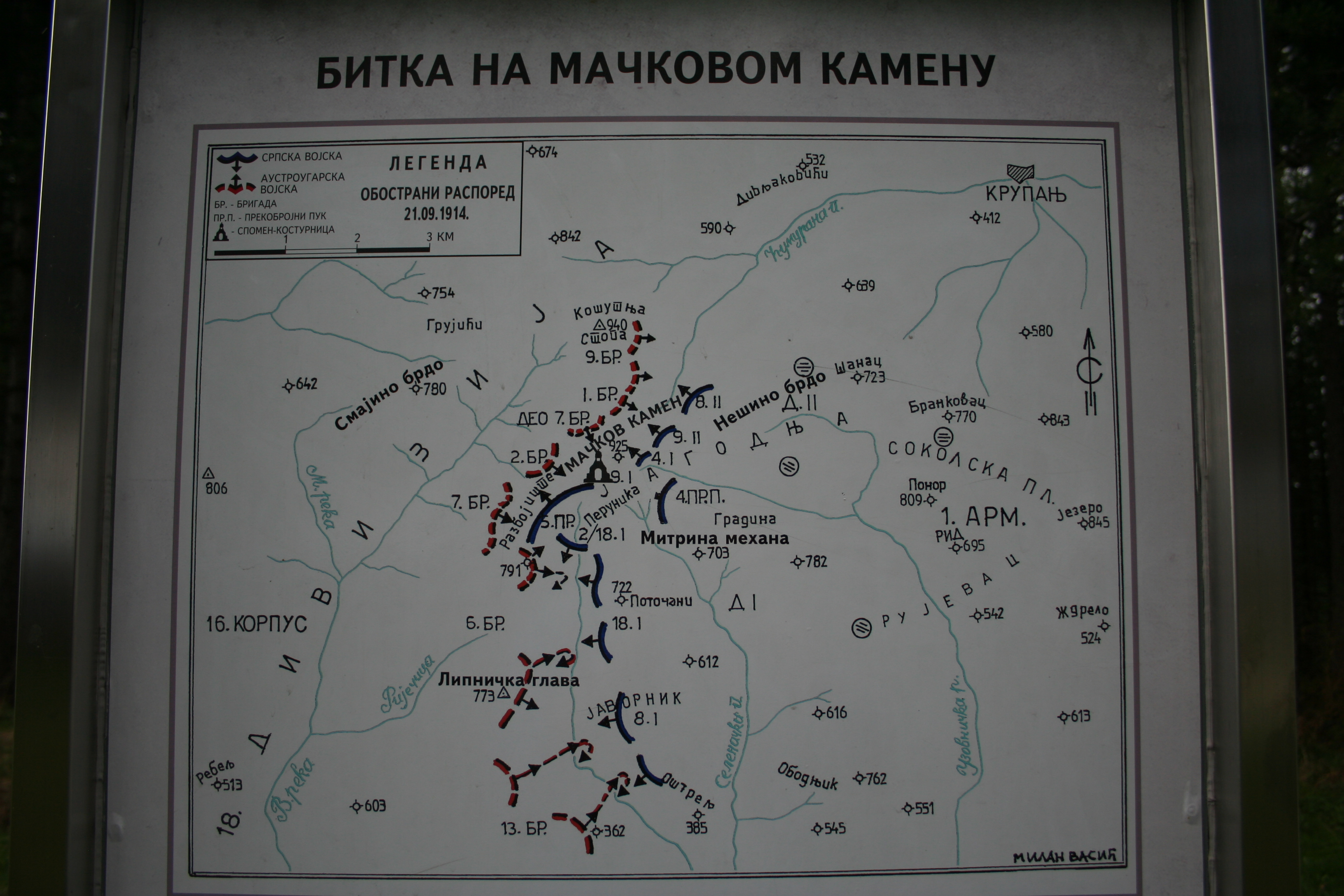 Spomen kosturnica na Mačkovom kamenu